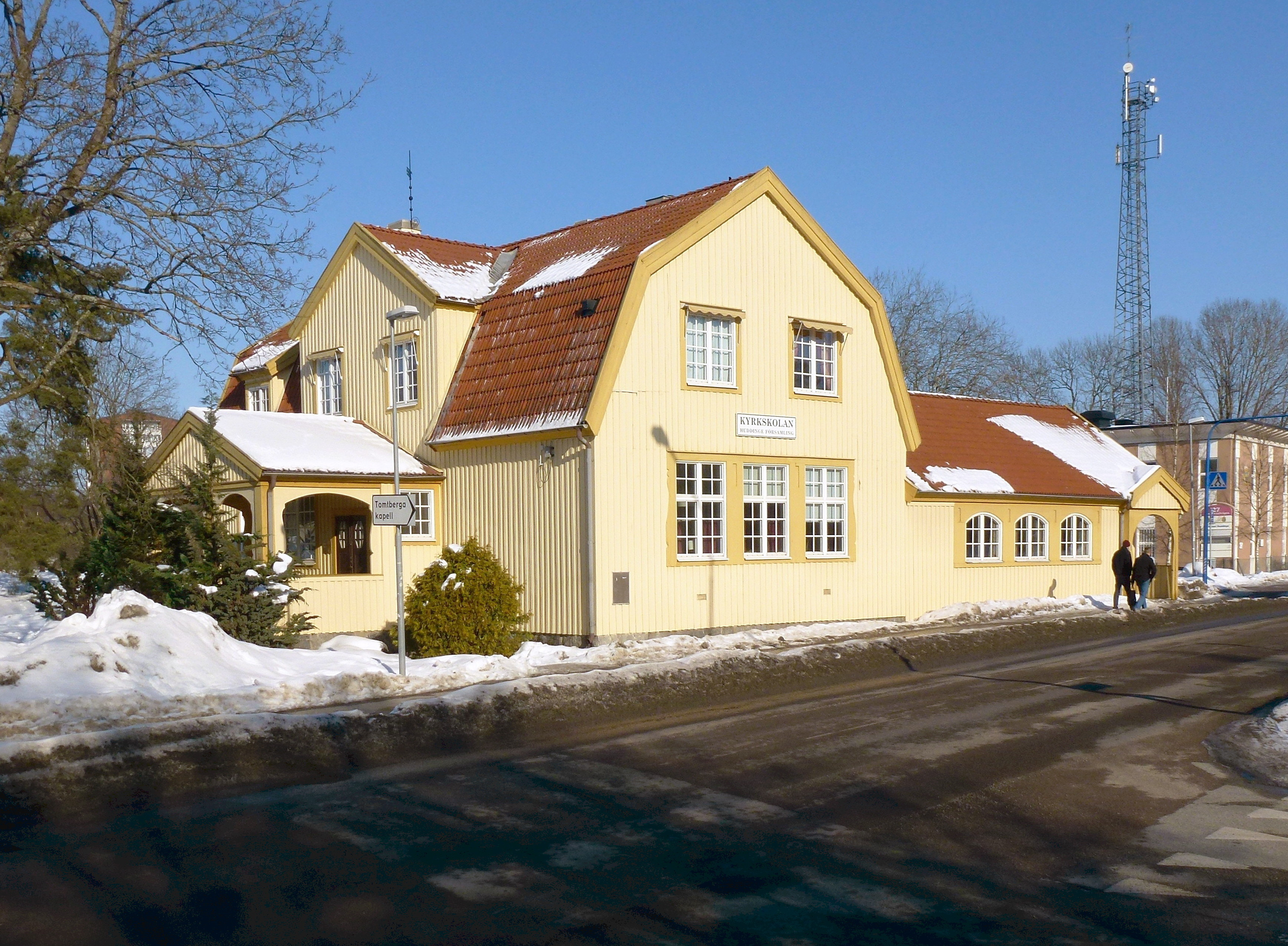 Huddinge kyrkskola, fasad